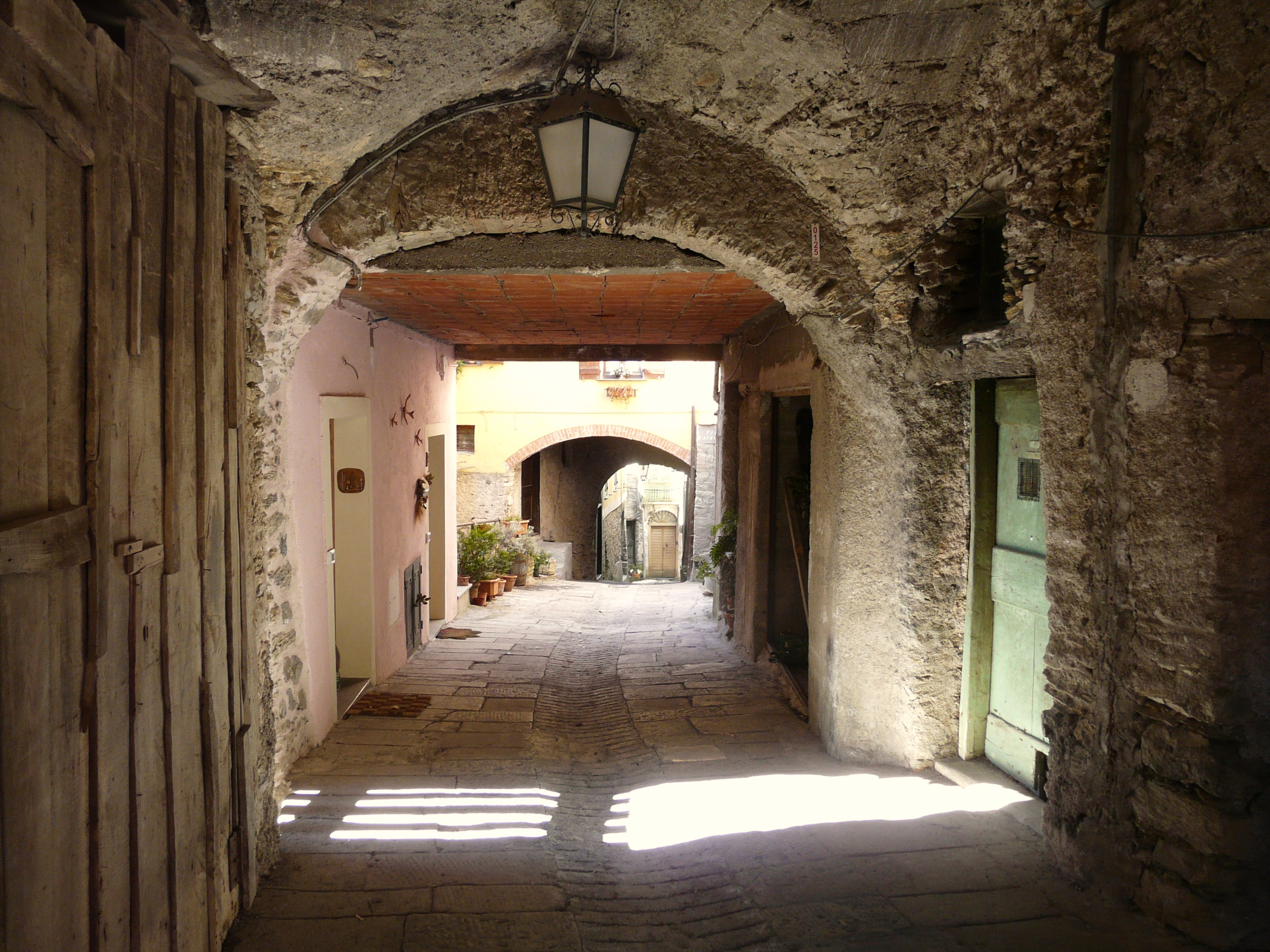 Cosio di Arroscia, Liguria, Italia